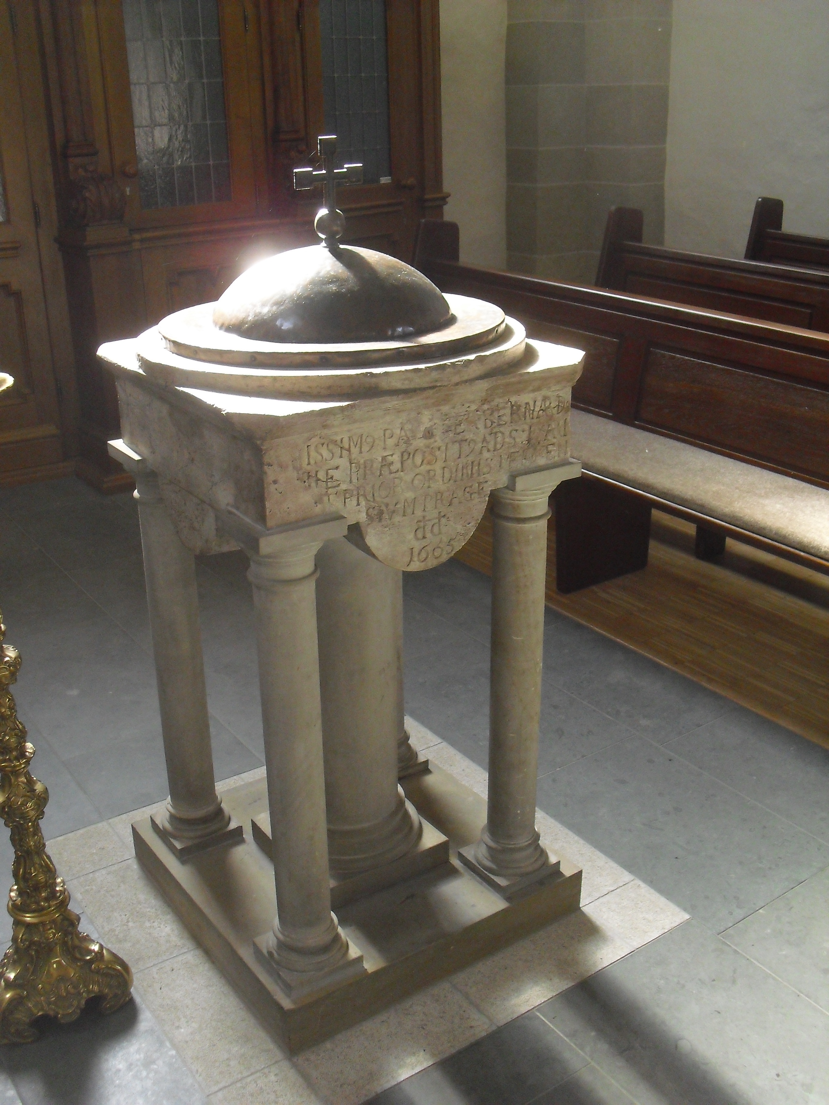 Taufbecken der St. Marien-Kirche in Neuenbeken